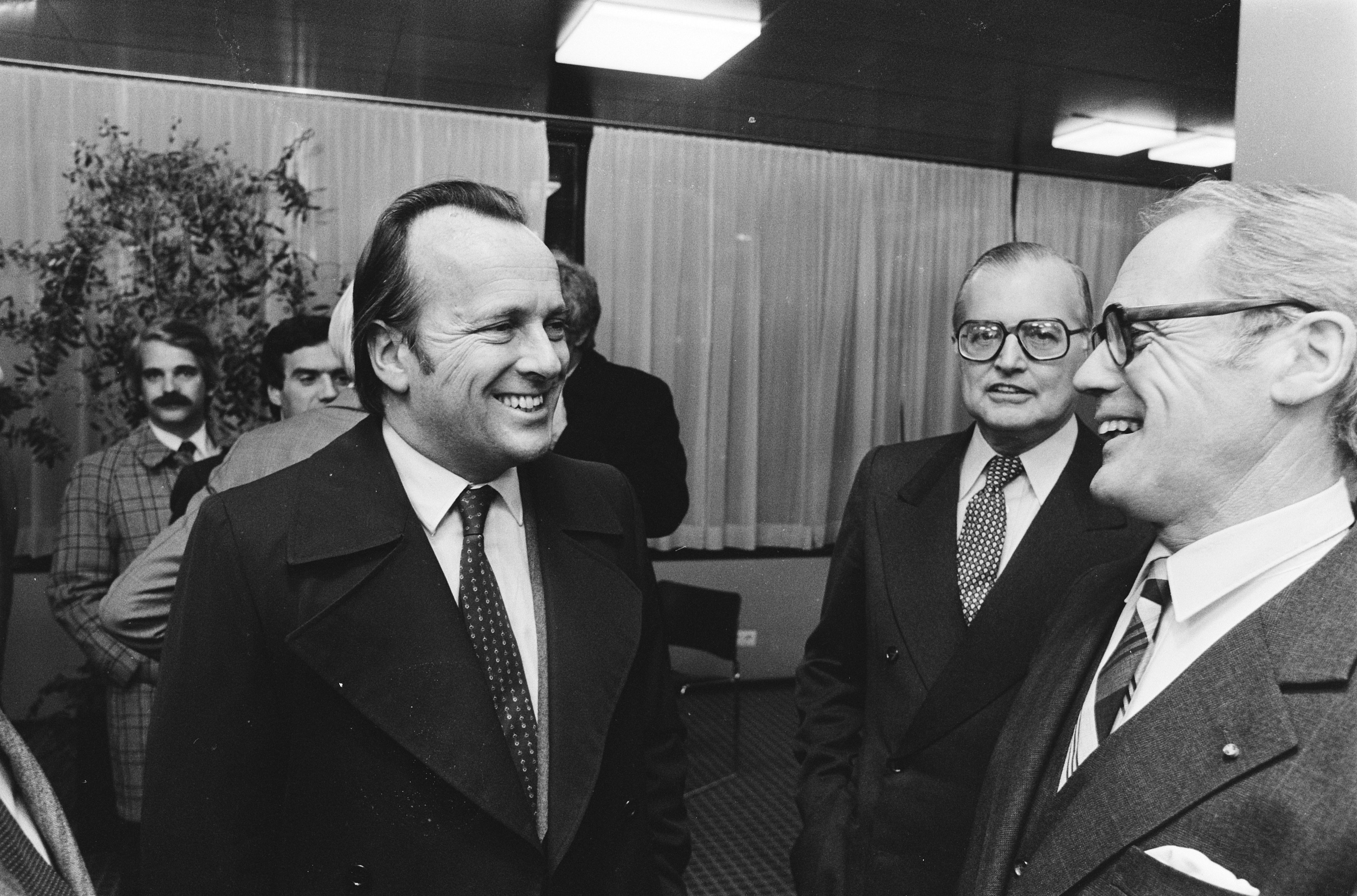 Collectie / Archief : Fotocollectie Anefo Reportage / Serie : [ onbekend ] Beschrijving : Aankomst Portugese premier Pinto Balsemão voor werkbezoek op Schiphol. 15 (l.) Premier Balsemao en (r.) jonkheer mr. Beelaerts van Blokland Datum : 24 februari 1982 Locatie : Noord-Holland, Schiphol Trefwoorden : ministers, premiers Persoonsnaam : Balsemao, Francisco Fotograaf : Bogaerts, Rob / Anefo Auteursrechthebbende : Nationaal Archief Materiaalsoort : Negatief (zwart/wit) Nummer archiefinventaris : bekijk toegang 2.24.01.05 Bestanddeelnummer : 932-0005